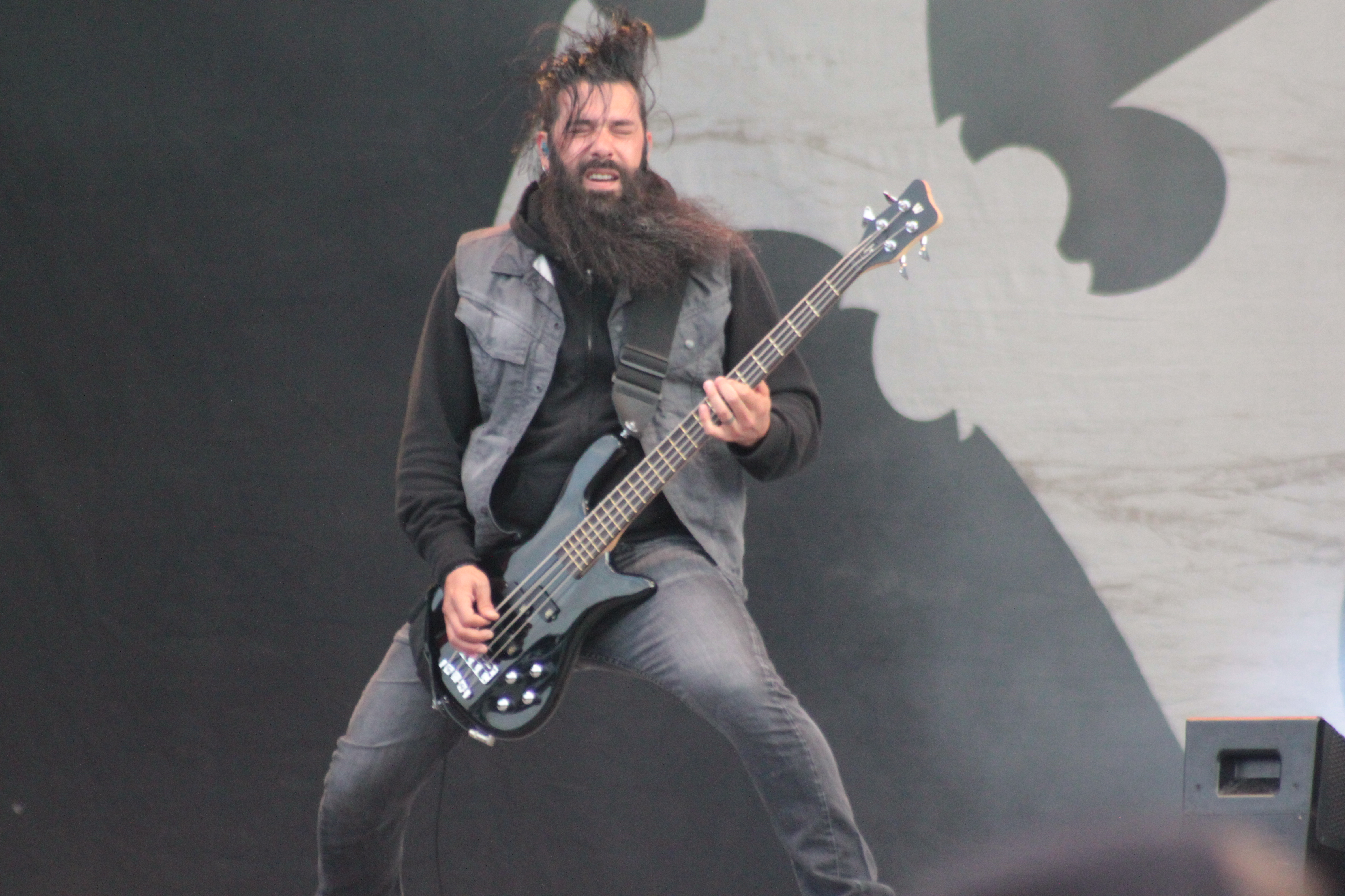 Johny Chow, Stone Sour, Hellfest 2013, Fr-44-Clisson.